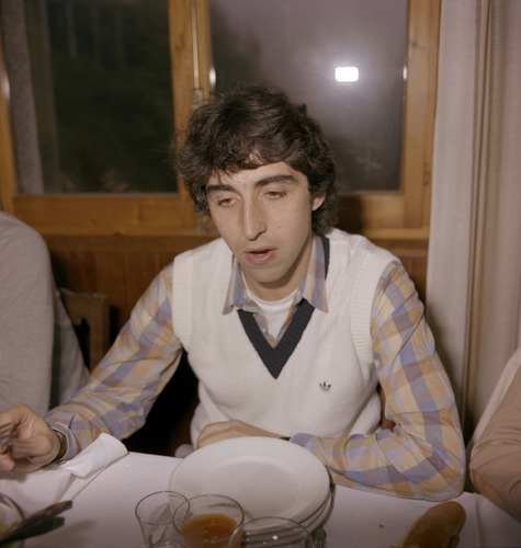 Diego Alvarez in 1981